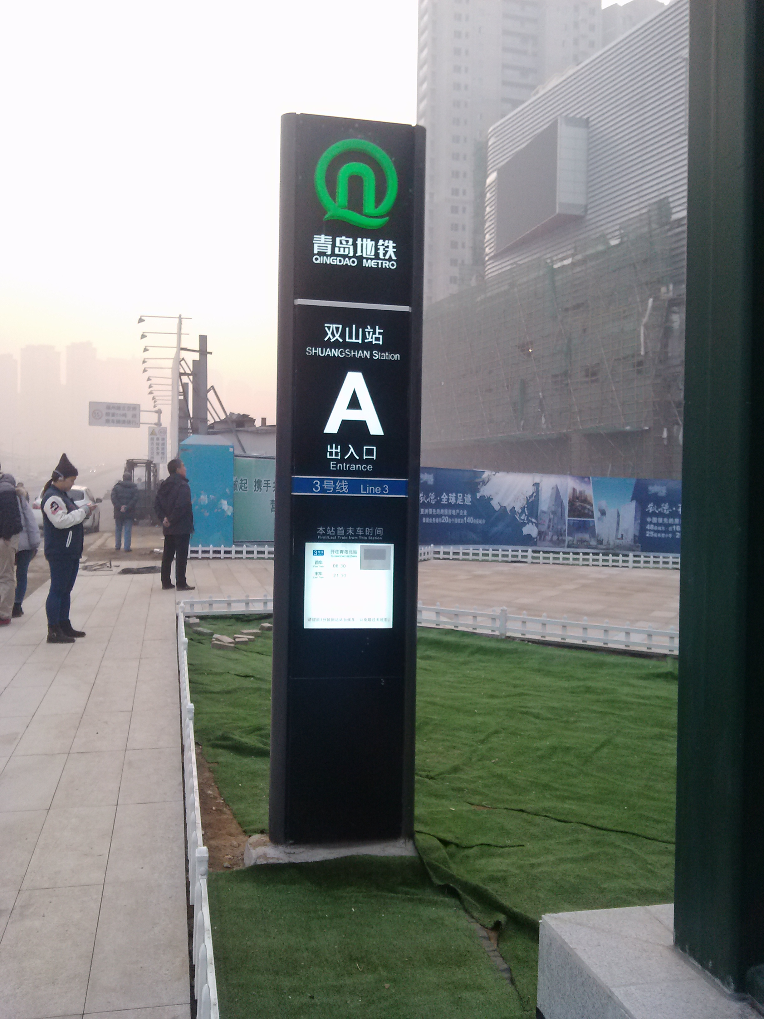 青岛地铁三号线双山站A口